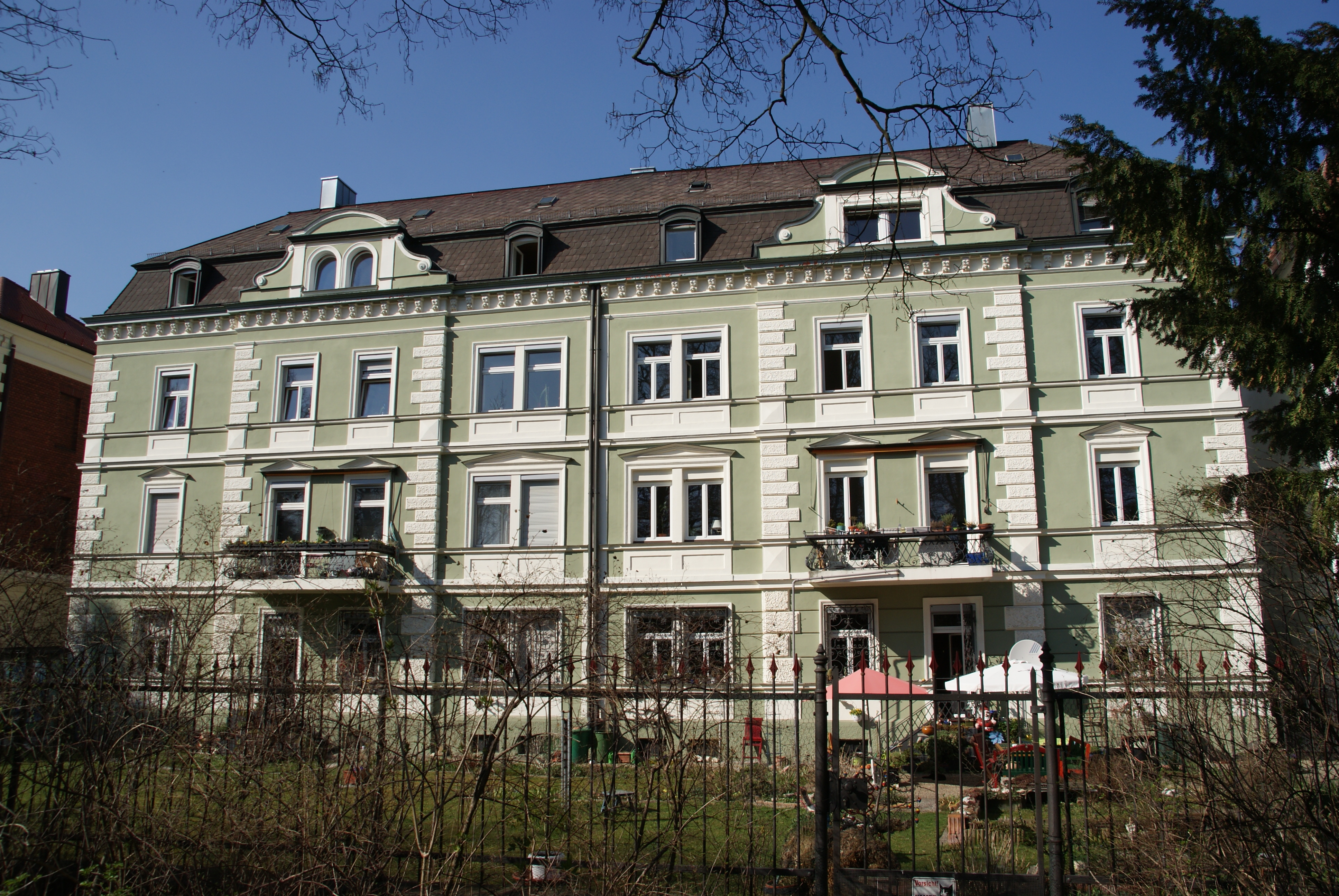 Doppelhaus zusammen mit Nr. 24, dreigeschossiger Mansardwalmdachbau mit Risaliten an der Alleeseite, Putzgliederungen in Neurenaissance-Formen, 1890 von Johann Zimmermann; Südfront über Fundament der Zwingermauer